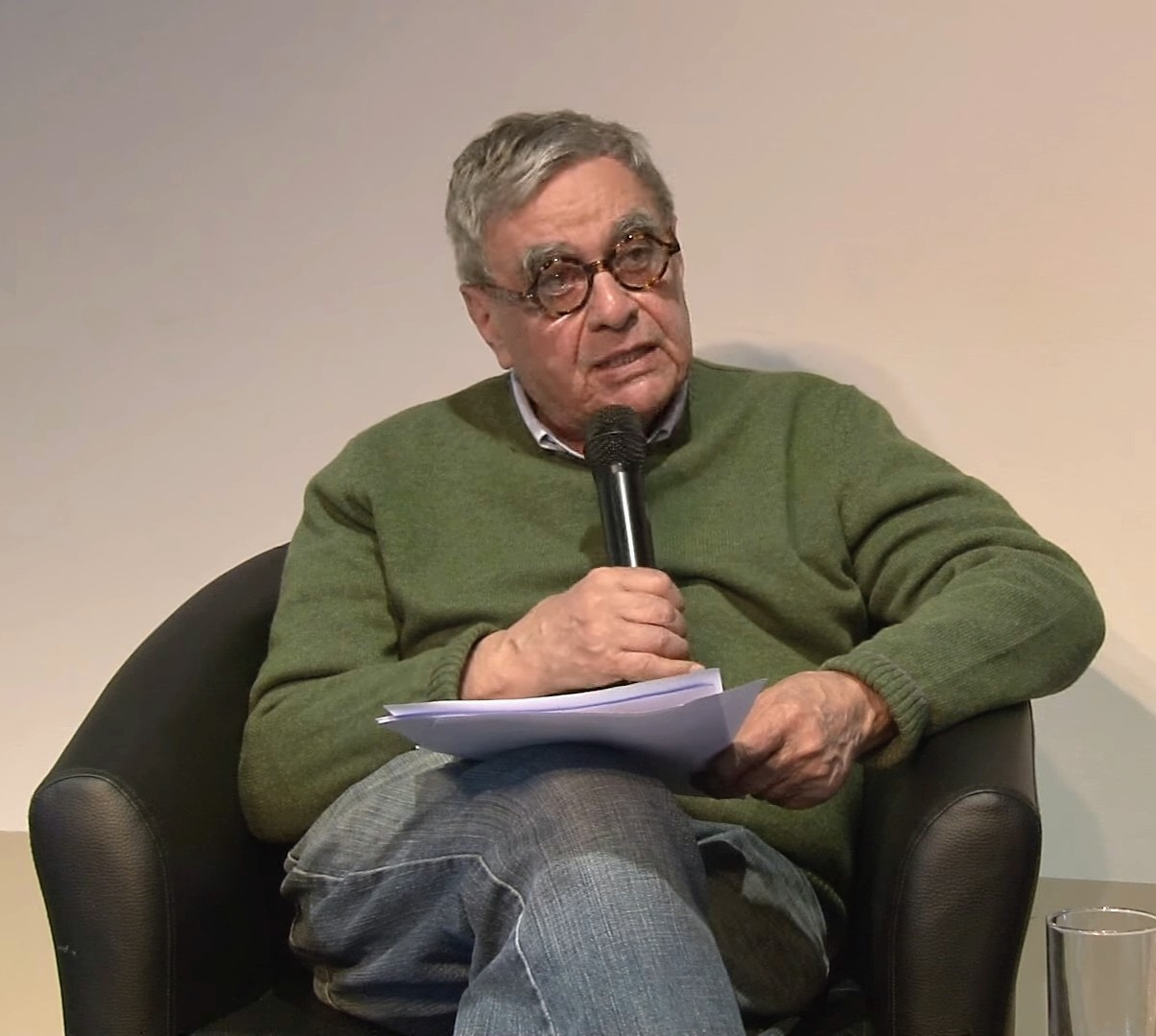 Luxemburg Lecture by Harry Harootunian. Berlin, 4.4.2016 Moderation Michael Brie (Rosa-Luxemburg-Stiftung) [DE] Marx nach Marx oder der Imperativ der Dekolonialisierung Luxemburg Lecture mit Harry Harootunian Harry Harootunian ist Max-Palevsky-Professor em. und Forscher am Weatherhead East Asian Institute der Columbia University in New York. Er ist Autor einer Reihe von Büchern über die kulturelle und intellektuelle Geschichte Japans und zu Fragen der geschichts- und sozialwissenschaftlichen Theorie. Er ist Mitglied der American Academy of Arts and Sciences. Sein Jüngstes Buch, erschienen im November 2015 ist «Marx After Marx: History and Time in the Expansion of Capitalism». In diesem Buch stellt Harry Harootunian die Annahmen des westlichen Marxismus und dessen These von der endgültigen Gestalt, die dieser Kapitalismus im Westen genommen habe, in Frage. Er führt eine radikale De-Provinzialisierung des Werkes von Marx durch, indem er zu den ursprünglichen Erklärungen für die Entstehung und Entwicklung des Kapitalismus zurückkehrt, die weit über Europa und Nordamerika auf Asien, Afrika und Lateinamerika verweist: Dadurch können die gegensätzlichen Wege verstanden werden, die der Kapitalismus im 20. Jahrhundert genommen hat. Harootunian stützt sich dabei auf u.a. Rosa Luxemburg, Wladimir Lenin und Antonio Gramsci. Es entsteht ein Verständnis von Weltgeschichte, in der Raum, Zeit und reale Kämpfe die Systeme der Kapitalverwertung regional geprägt haben. Moderation: Michael Brie Website